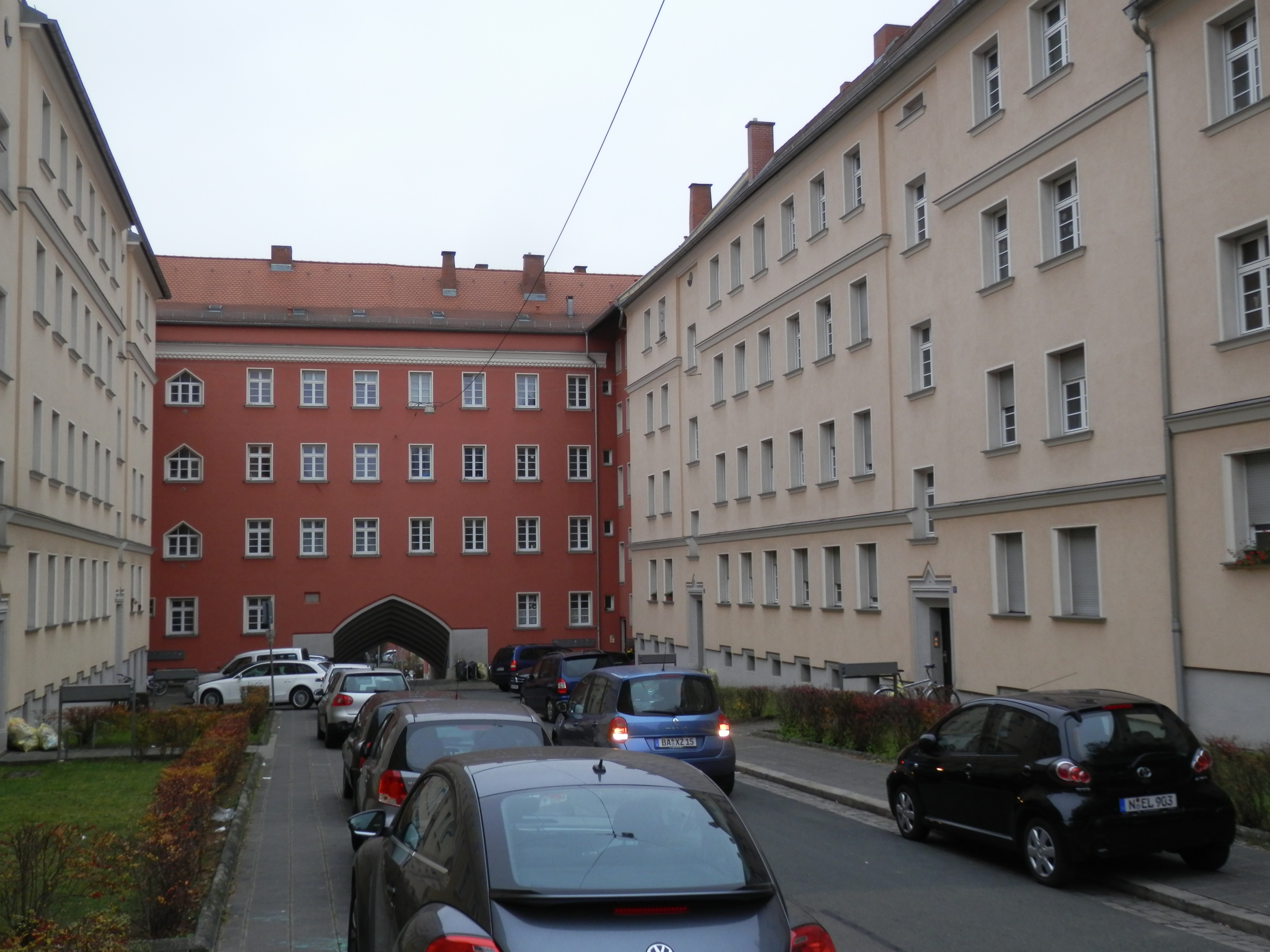 Häuser der städtischen Wohnungsbaugesellschaft Nürnberg von 1925-1927 an der Kirschgartenstraße